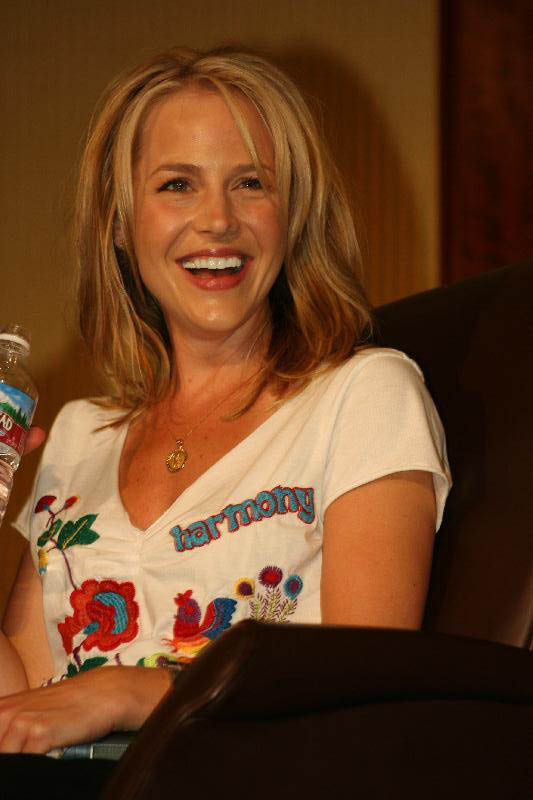 Julie Benz at the Booster Bash